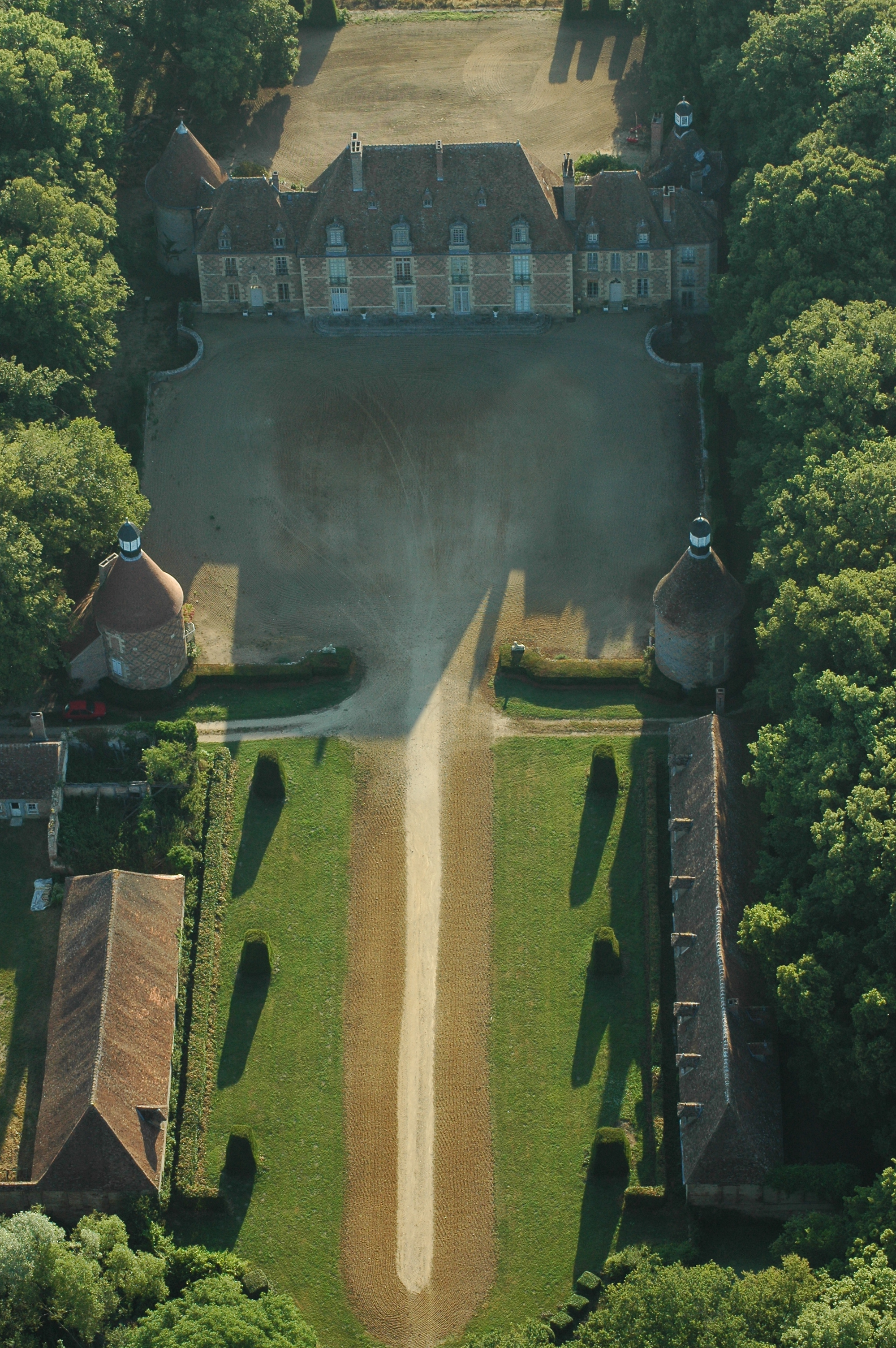 Le château de Pomay à Lusigny, Allier, France.